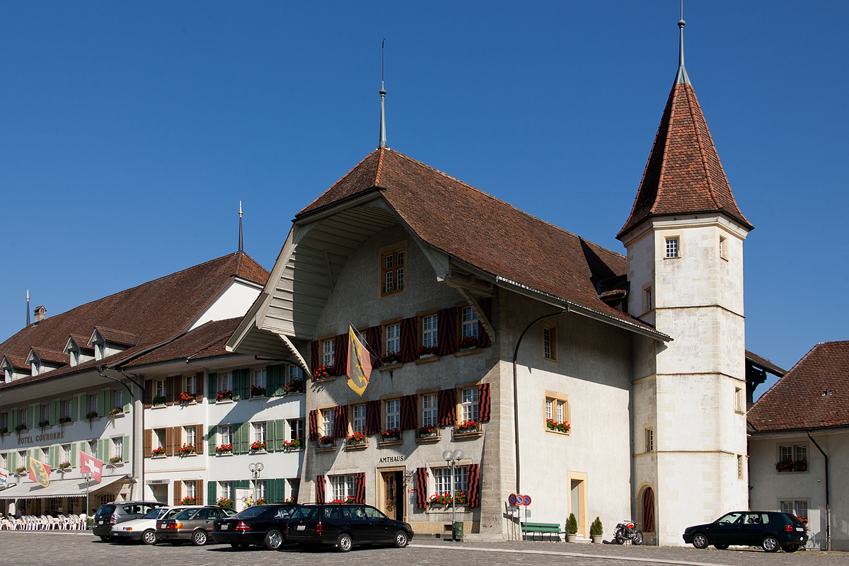 Schloss Aarberg in Aarberg (BE)